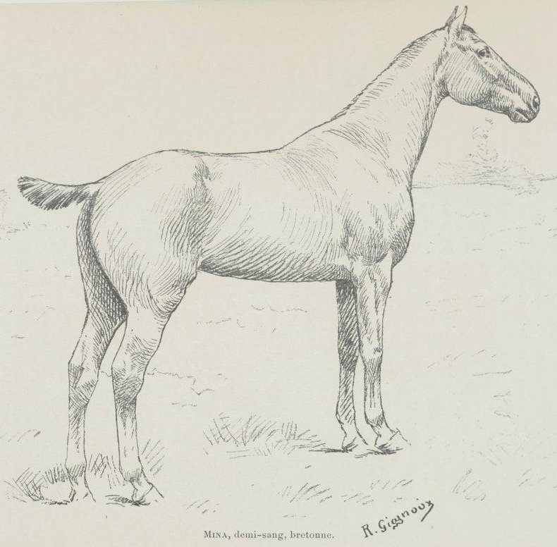 Mina, jument demi-sang de Corlay, par R. Gignoux dans Le cheval de selle en France, Paris, A. Legoupy, 1898 (voir lien sur Gallica